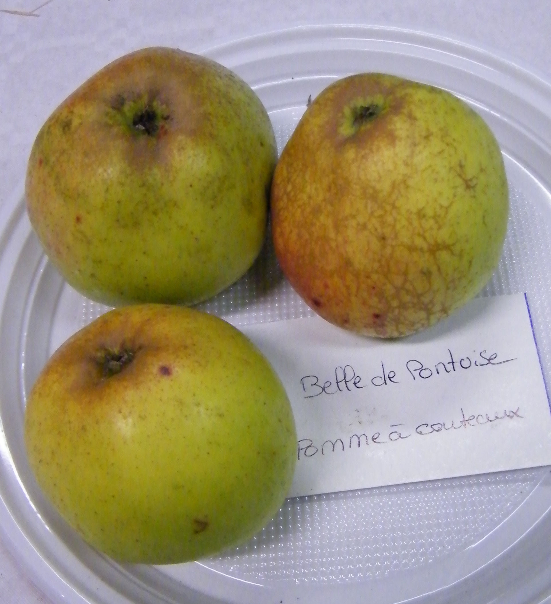 Belle de Pontoise (2), Mons-Boubert, Somme, Fr